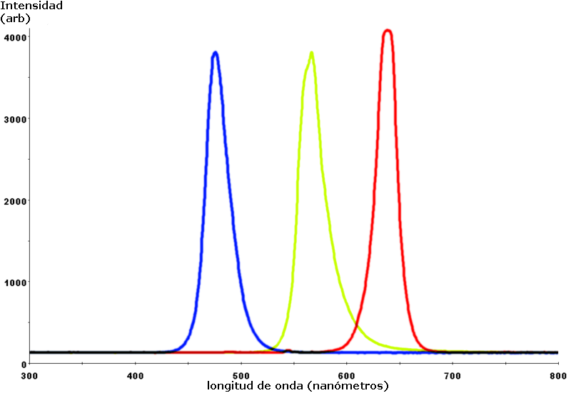 Combinado de curvas